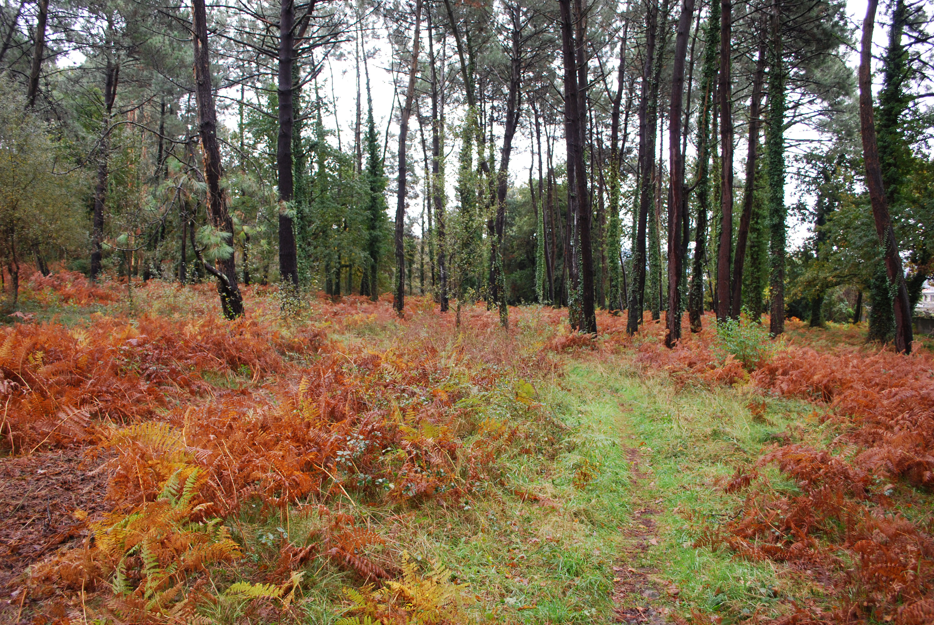 Piñeiros do Colmeote, A Gándara, Narón A Coruña Galiza Spain